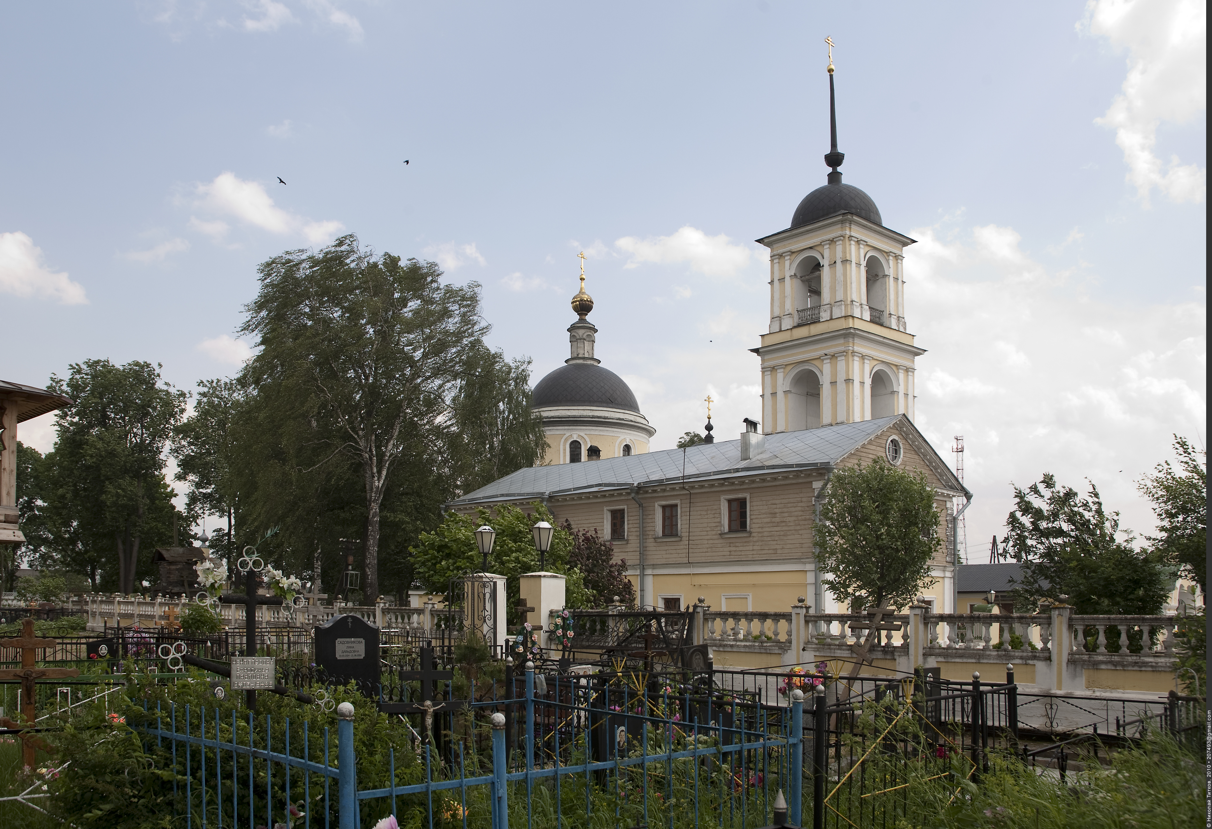 Однокупольный храм в стиле ампир с трапезной и трёхъярусной колокольней. В трапезной приделы Пятницкий и преподобной Марфы. Закрыт в 1937 году, вновь открыт в 1945 году.